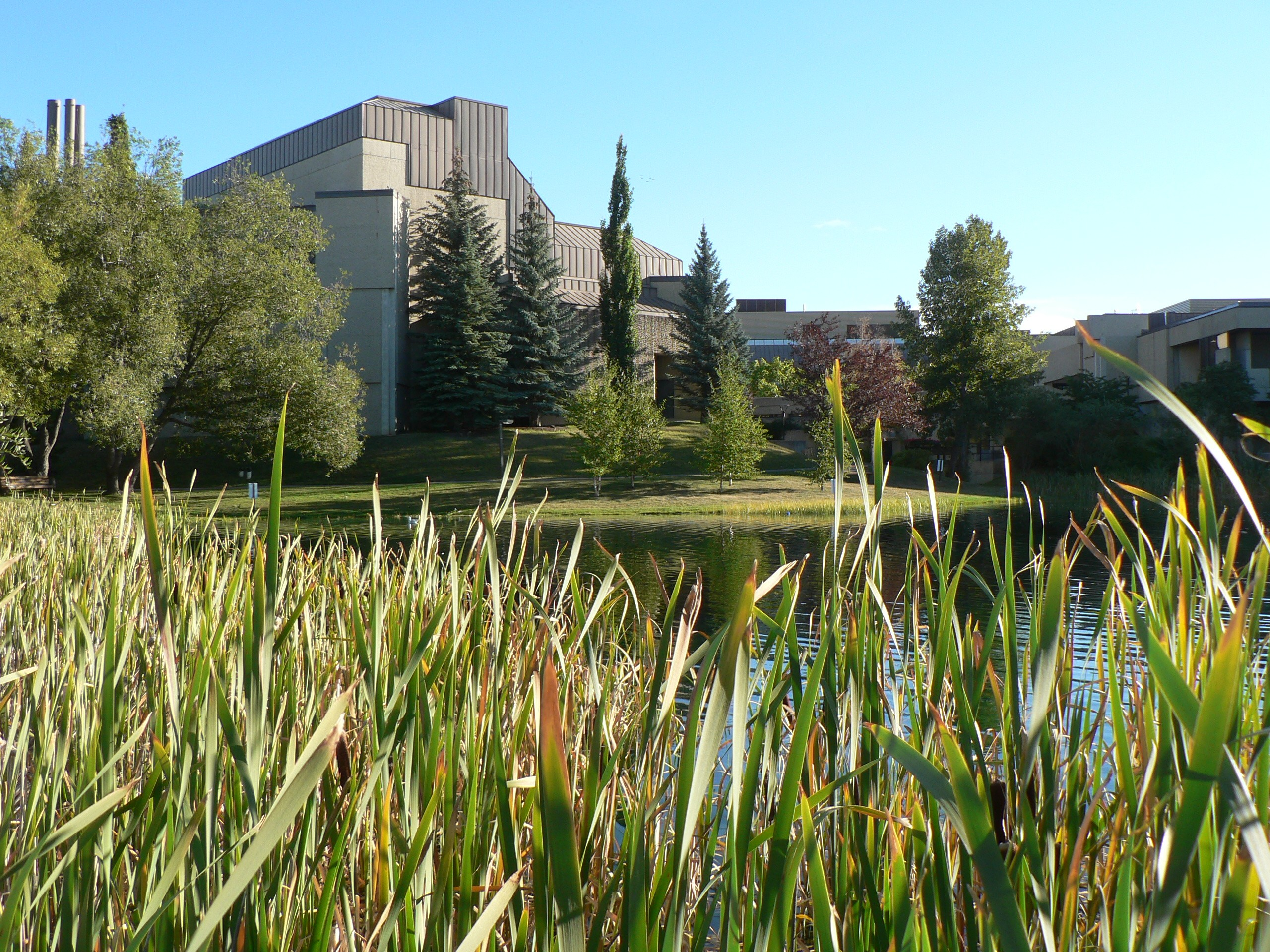 Reuse under CC-BY-SA on Wikipedia at